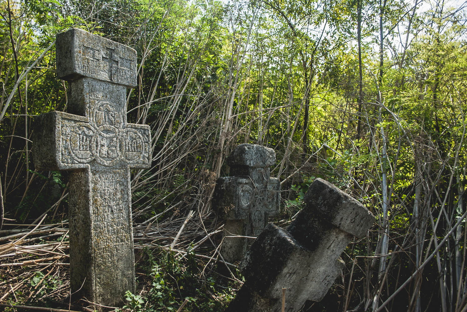 sat Lehliu, comuna Lehliu, jud. CalarasiRomână: „Cimitirul afurisit”, în partea de est a satului Lehliu, pe malul lacului Lehliu, sec. XVIII - XX